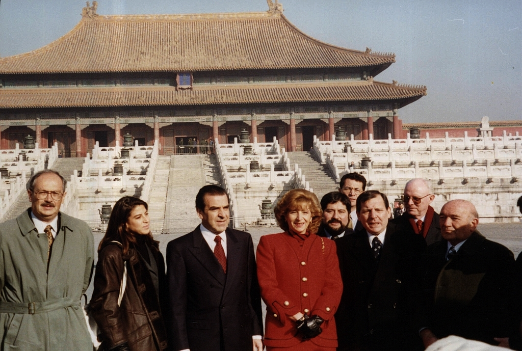 Jaime Estevez, Eduardo Frei, Marta Larraechea y Sergio Diez visitando la Plaza Tiananmen.